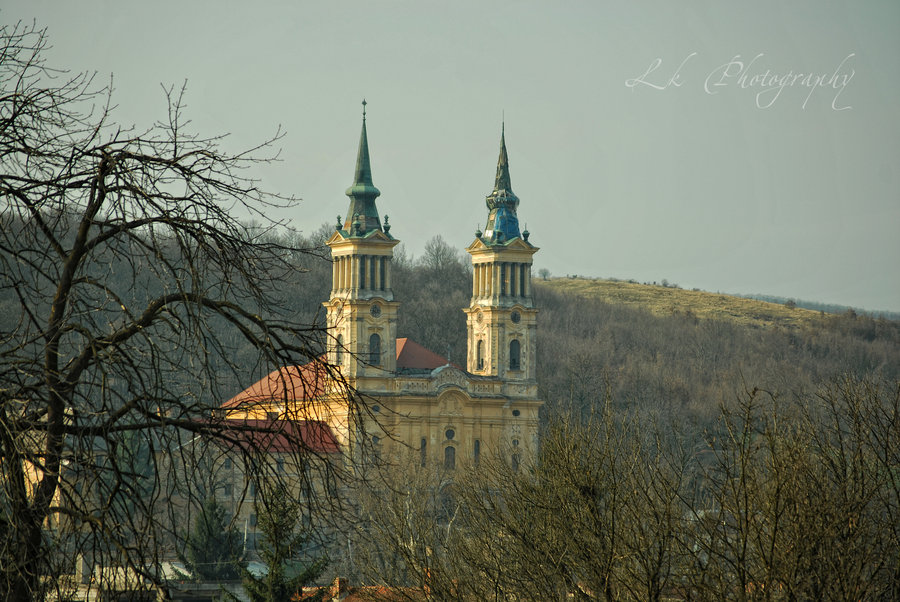 Biserica romano-catolică "Sf. Maria", Lipova, jud Arad Cod LMI AR-II-m-A-00616.01